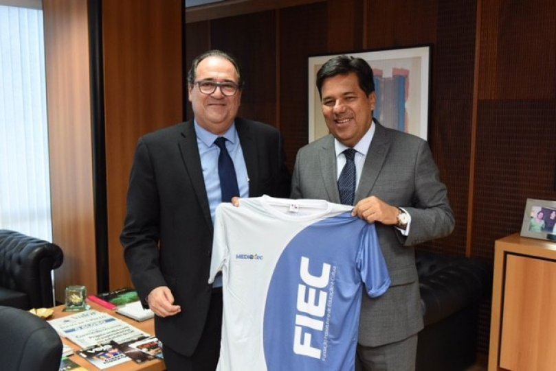 João Neto presenteou o ministro com uma camiseta feita especialmente para os alunos do Médiotec.